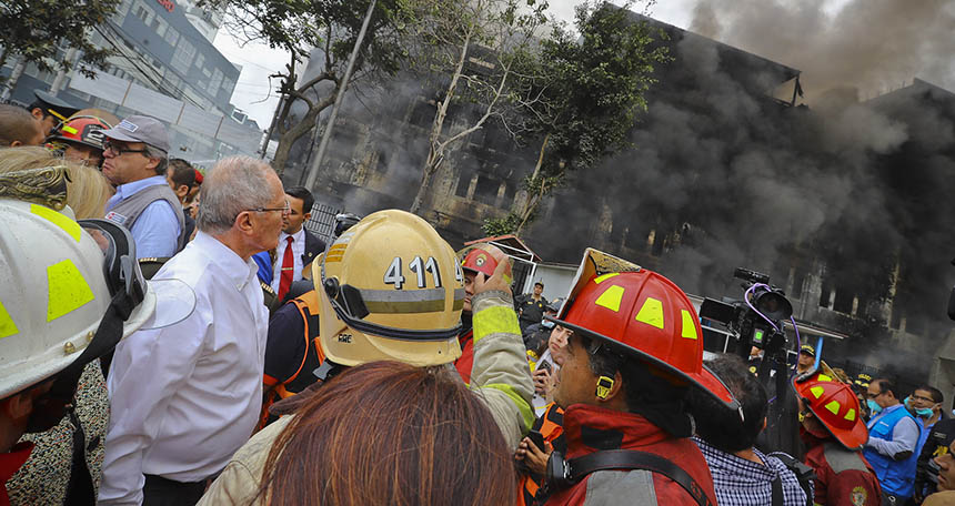 Presidente Kuczynski: “Los bomberos son una necesidad nacional y tenemos que apoyarlos”, durante el Incendio en la zona conocida como Malvinas en Lima, Perú.